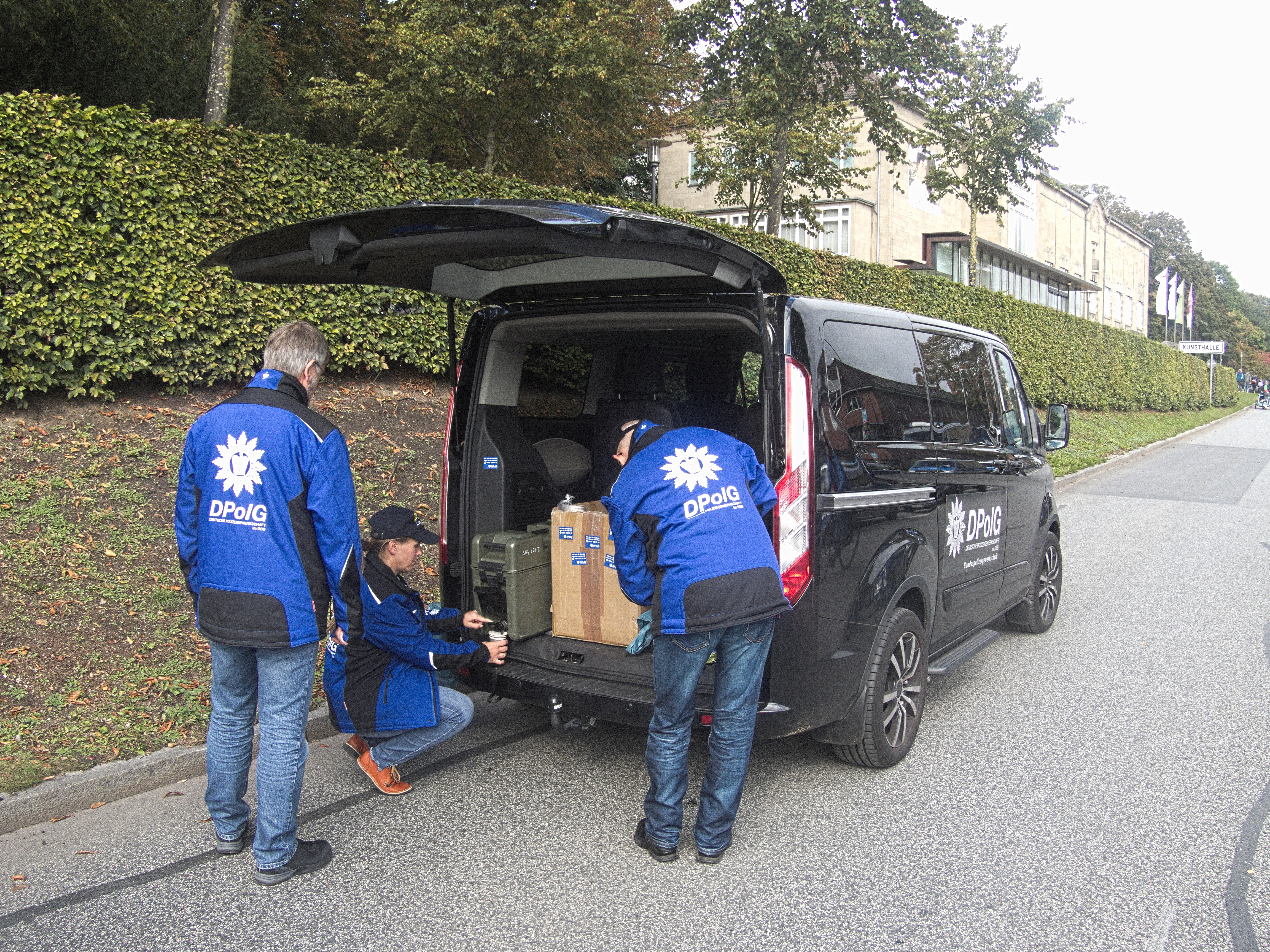 Ehrenamtliche Helfer der Deutschen Polizeigewerkschaft im DBB (DPolG) auf dem Tag der deutschen Einheit in Kiel 2019. Vor Ort wurden Getränke und Snacks an die Polizisten vor Ort verteilt und die Stimmung mit kleinen "GiveAways" verbesssert (Stifte, Blöcke, Desinfektionssprays usw.). (Die abgebildeten Personen haben der Aufnahme zugestimmt)